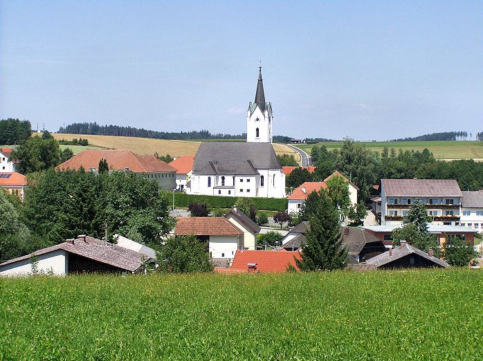 Meggenhofen